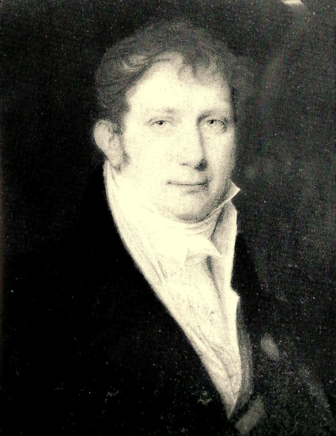 Scan eines Porträts von Joseph Aloys von Fürth